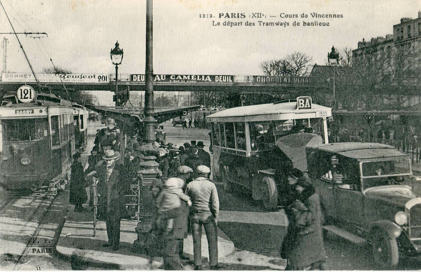 Carte postale ancienne éditée par FF n°1212PARIS XIIe - Cours de Vincennes - Le départ des Tramways de banlieue